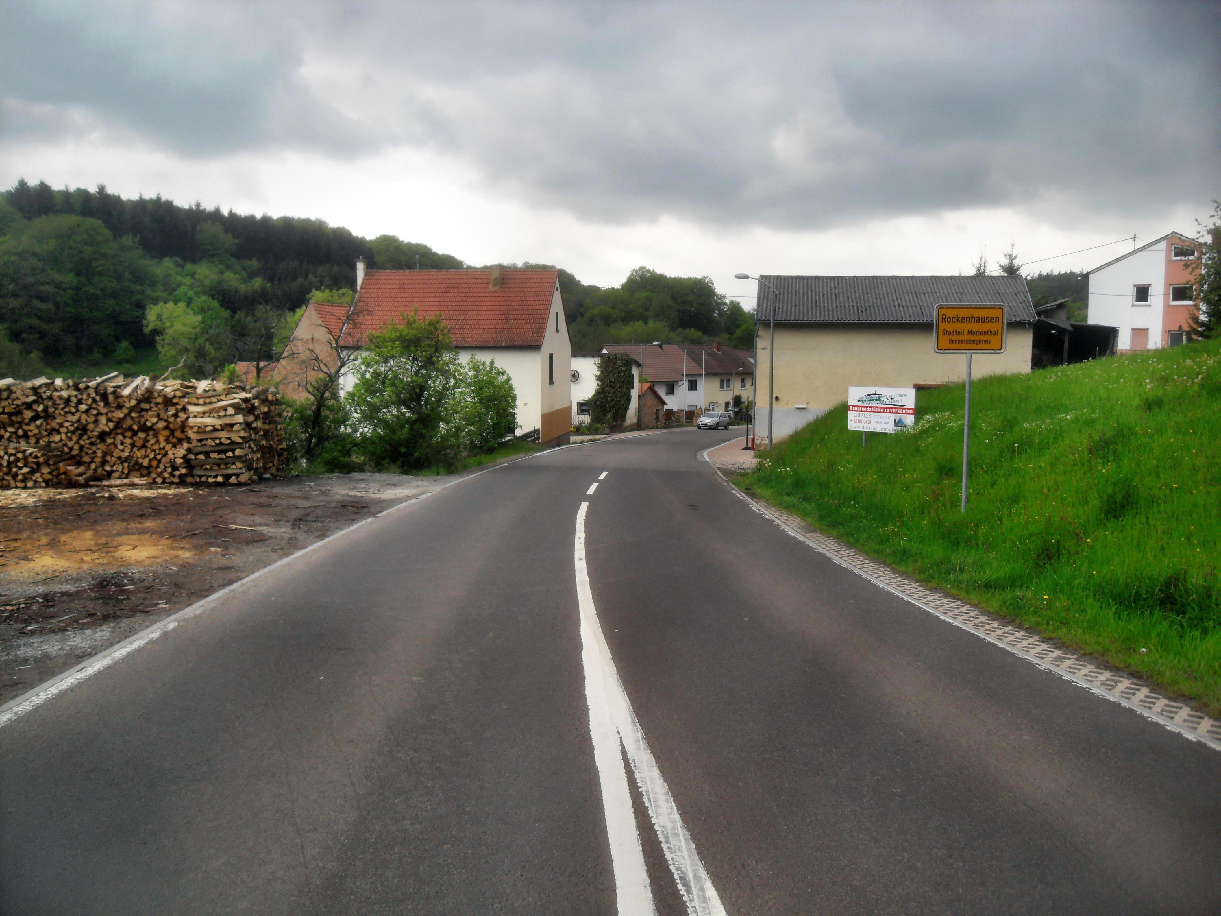 Einfahrt von Rockenhausen in der Pfalz in Rheinland-Pfalz (Deutschland) auf der L 386 von Kirchheimbolanden kommend